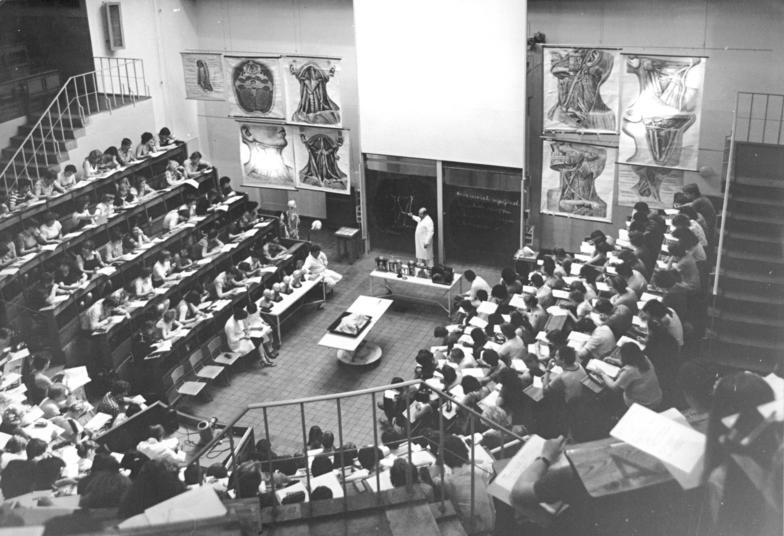 Leipzig, Universität, Hörsaal, Anatomievorlesung ADN-ZB Grubitzsch 22.6.81 Leipzig: Jeder 5. Student der Leipziger Karl-Marx-Universität ist Mediziner. Im Hörsaal des Anatomischen Instituts der Karl-Marx-Universität erhalten die Studenten eine Grundausbildung, u.a. bei Prof. Dr. sc. med. Gerald Leutert. An der Leipziger alma mater studieren zur Zeit mehr als 15000 junge Menschen an 20 Sektionen, neuen Instituten und im Bereich Medizin. Etwa ein Zehntel der Studenten sind Ausländer aus über 60 Ländern der Erde. (siehe 6N) Abgebildete Personen: Leutert, Gerald: Rektor der Karl-Marx-Universität Leipzig, DDR